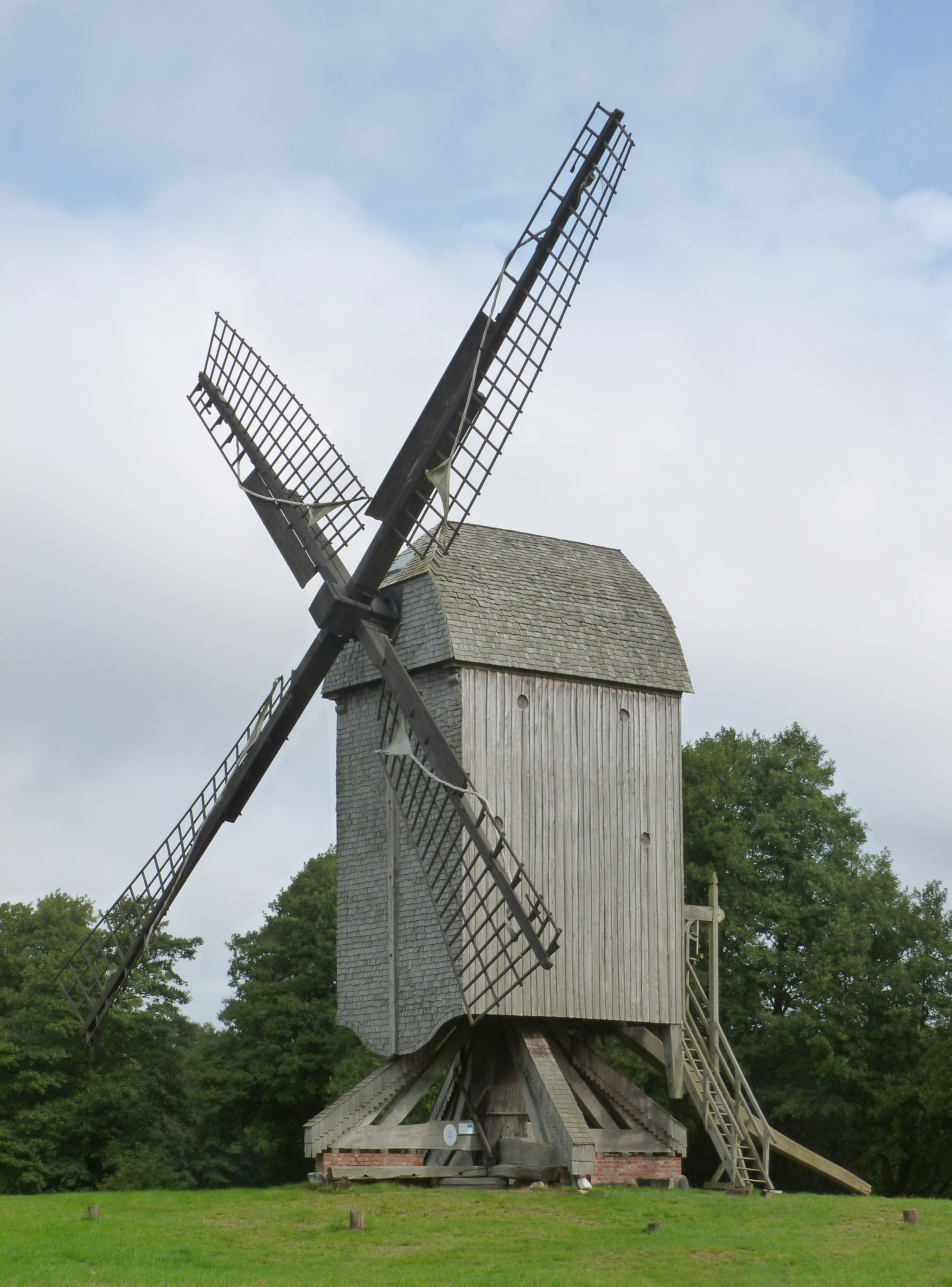 Die Bockwindmühle in Dudensen, einem Ortsteil von Neustadt am Rübenberge (Niedersachsen) wurde ca. 1690 erbaut, und von Diepholz nach Dudensen umgesetzt